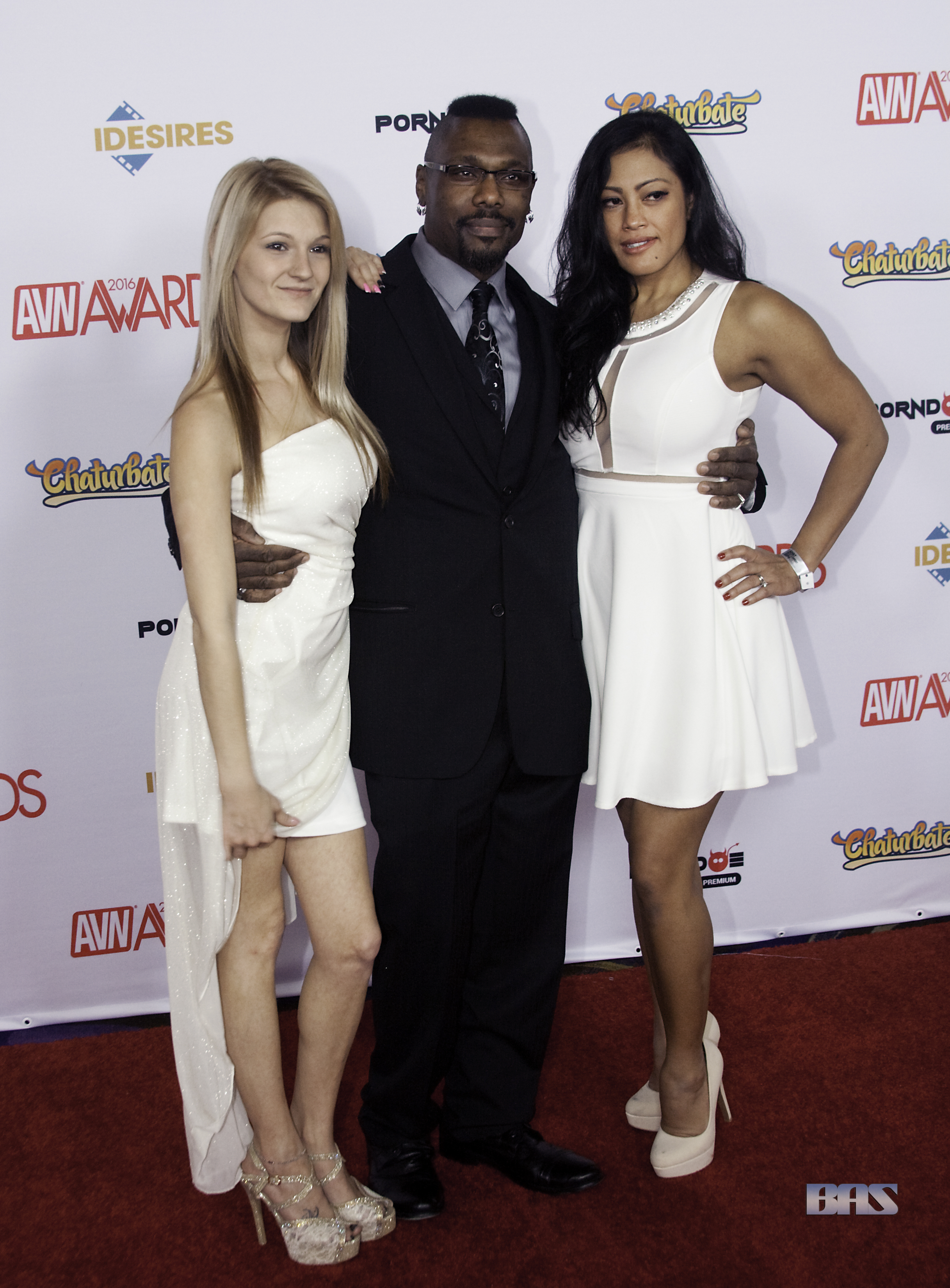 AVN16_0033bas